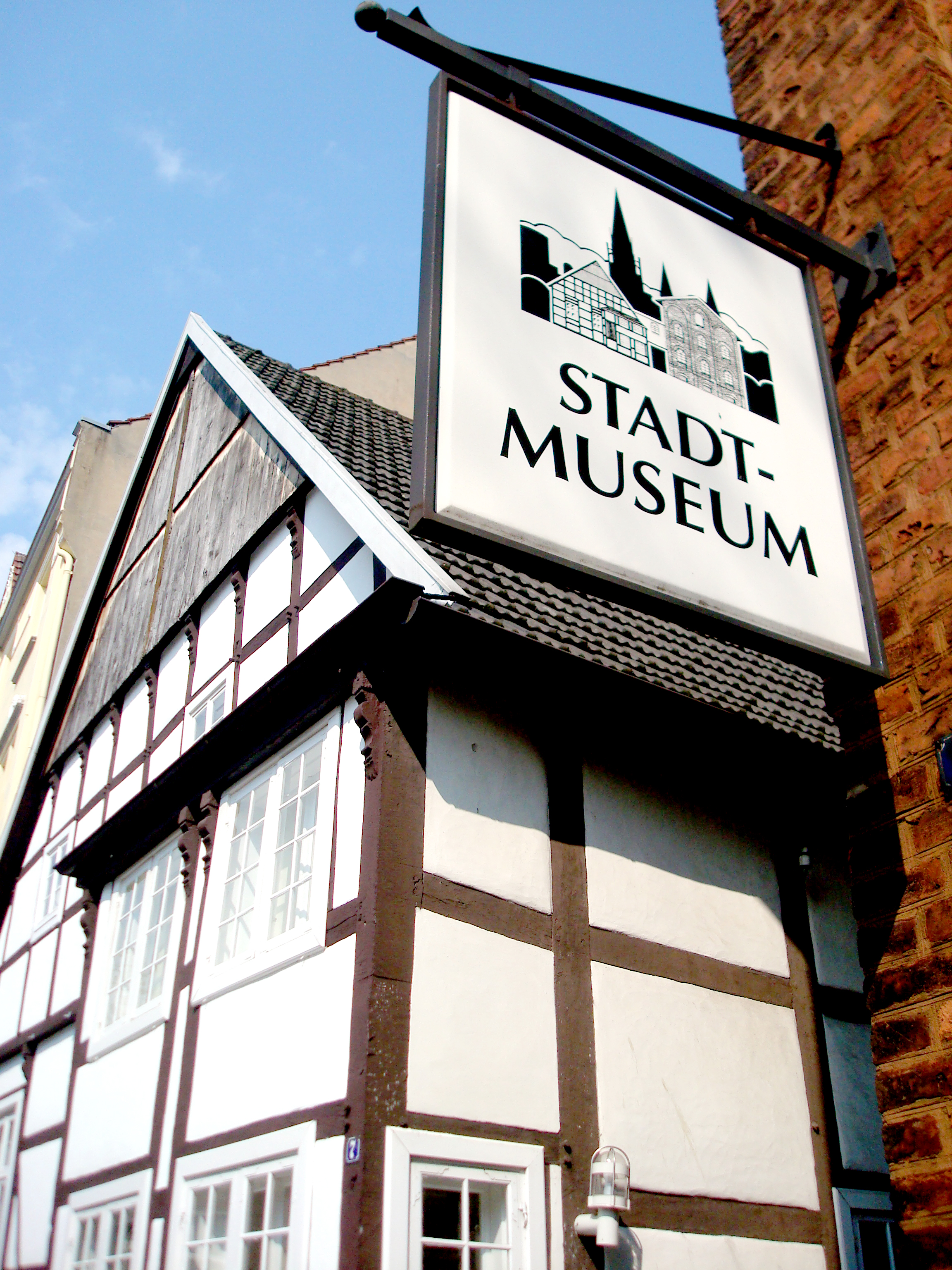 Stadtmuseum Gütersloh This image shows a heritage building in Germany, located in the North Rhine-Westphalian city Gütersloh (no. A 081).